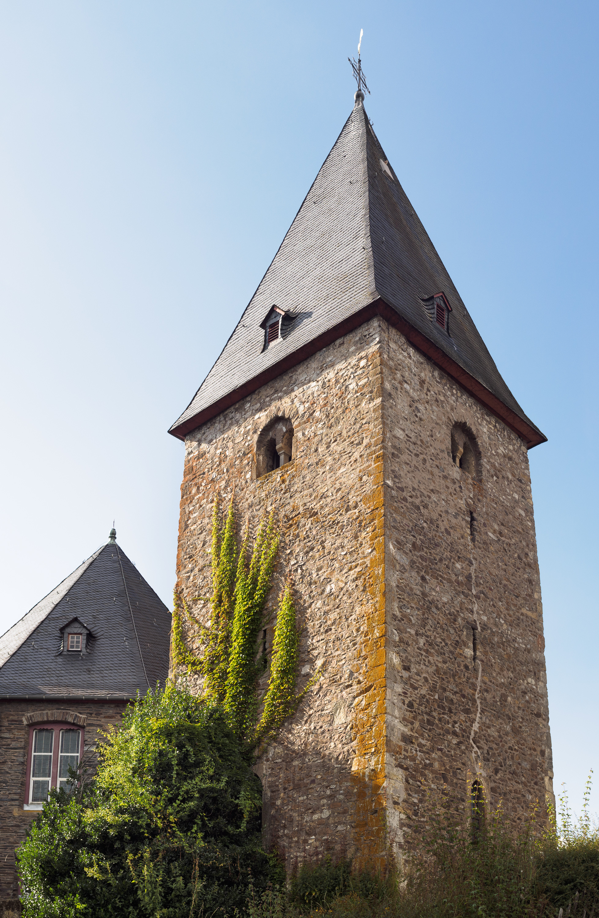 Turm Evangelische Kirche Hottenbach